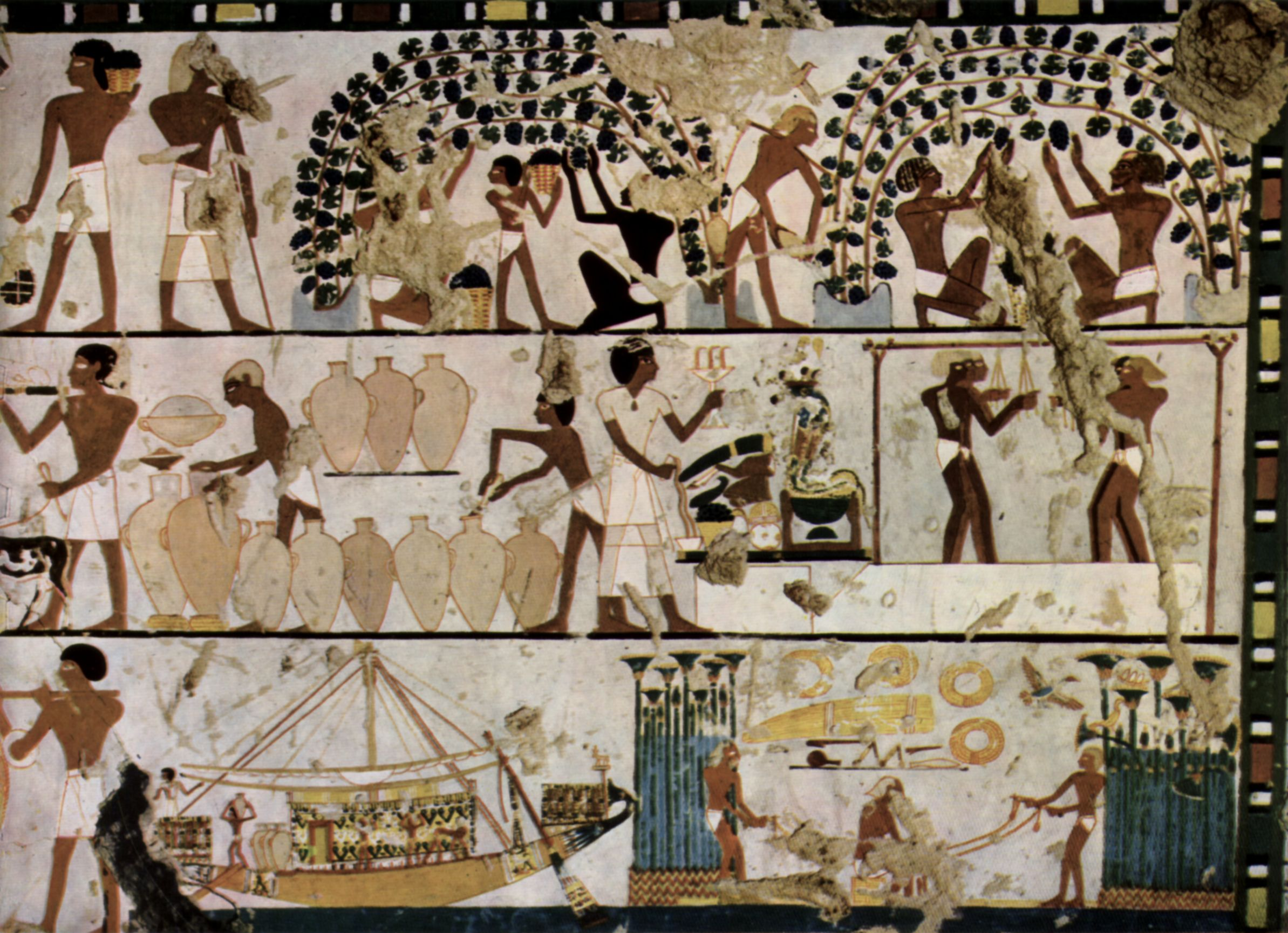 Ägyptischer Maler um 1500 v. Chr.: Grabkammer: Wandgestaltung